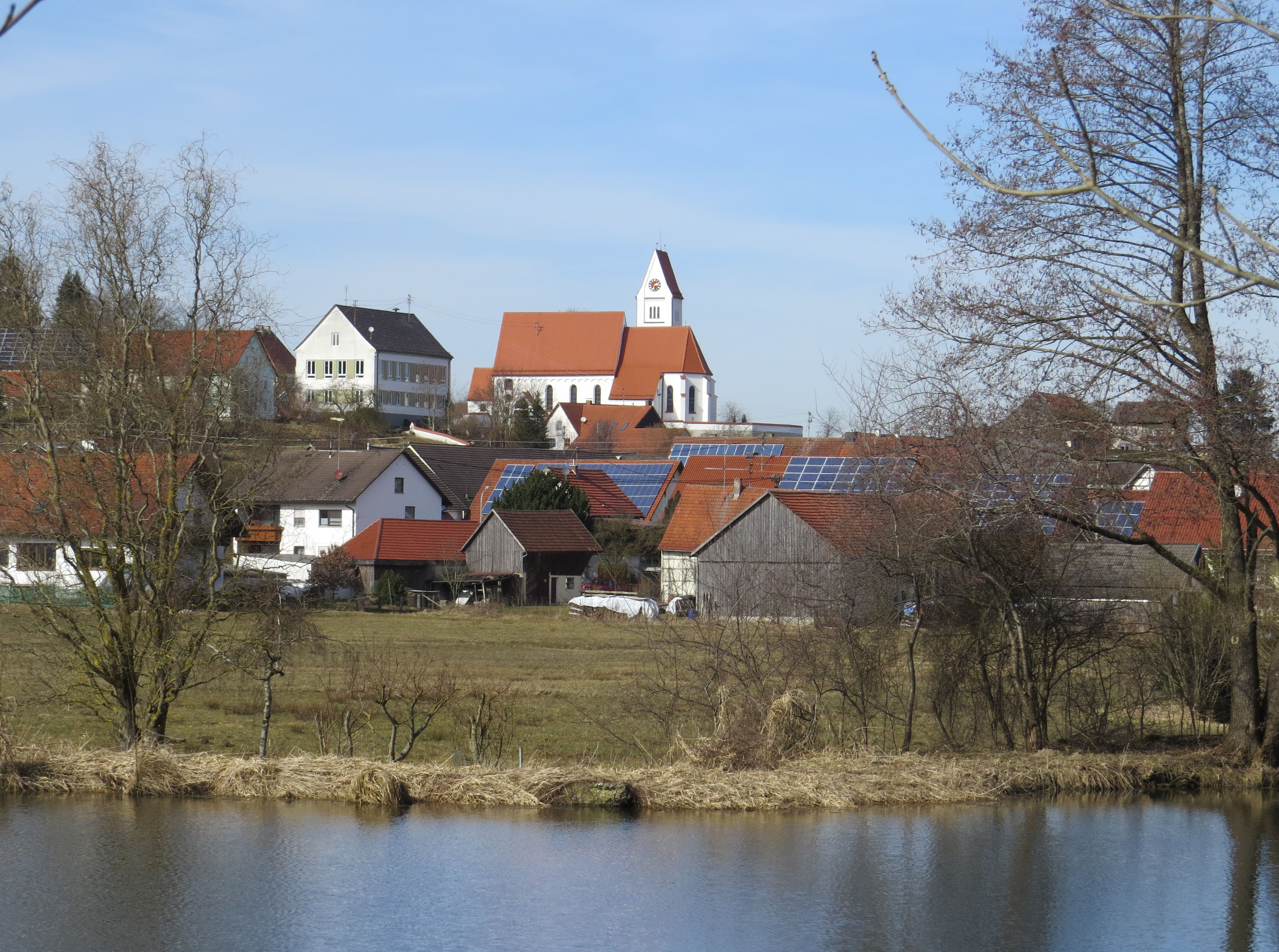 Ebershausen von Süden